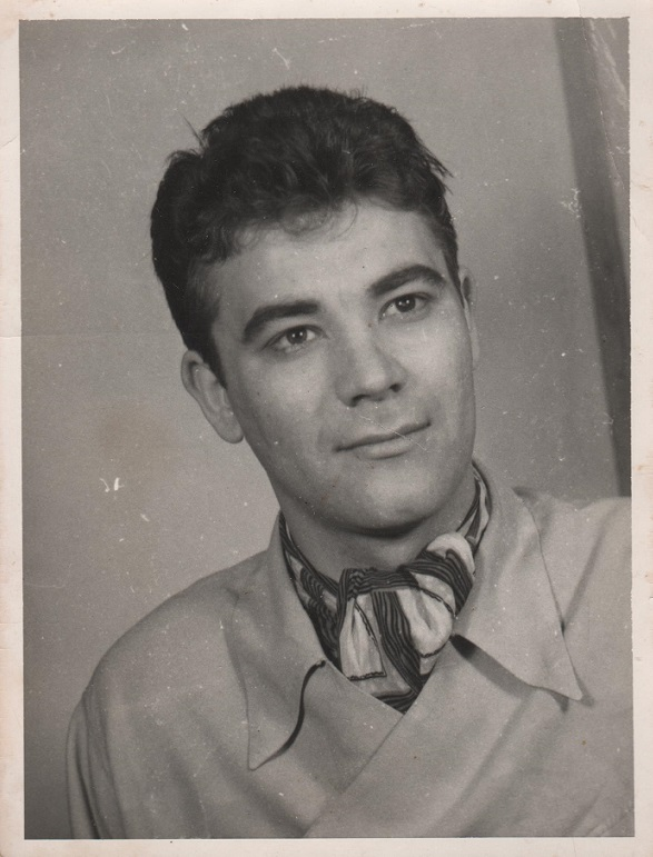 Kóti Árpád színművész